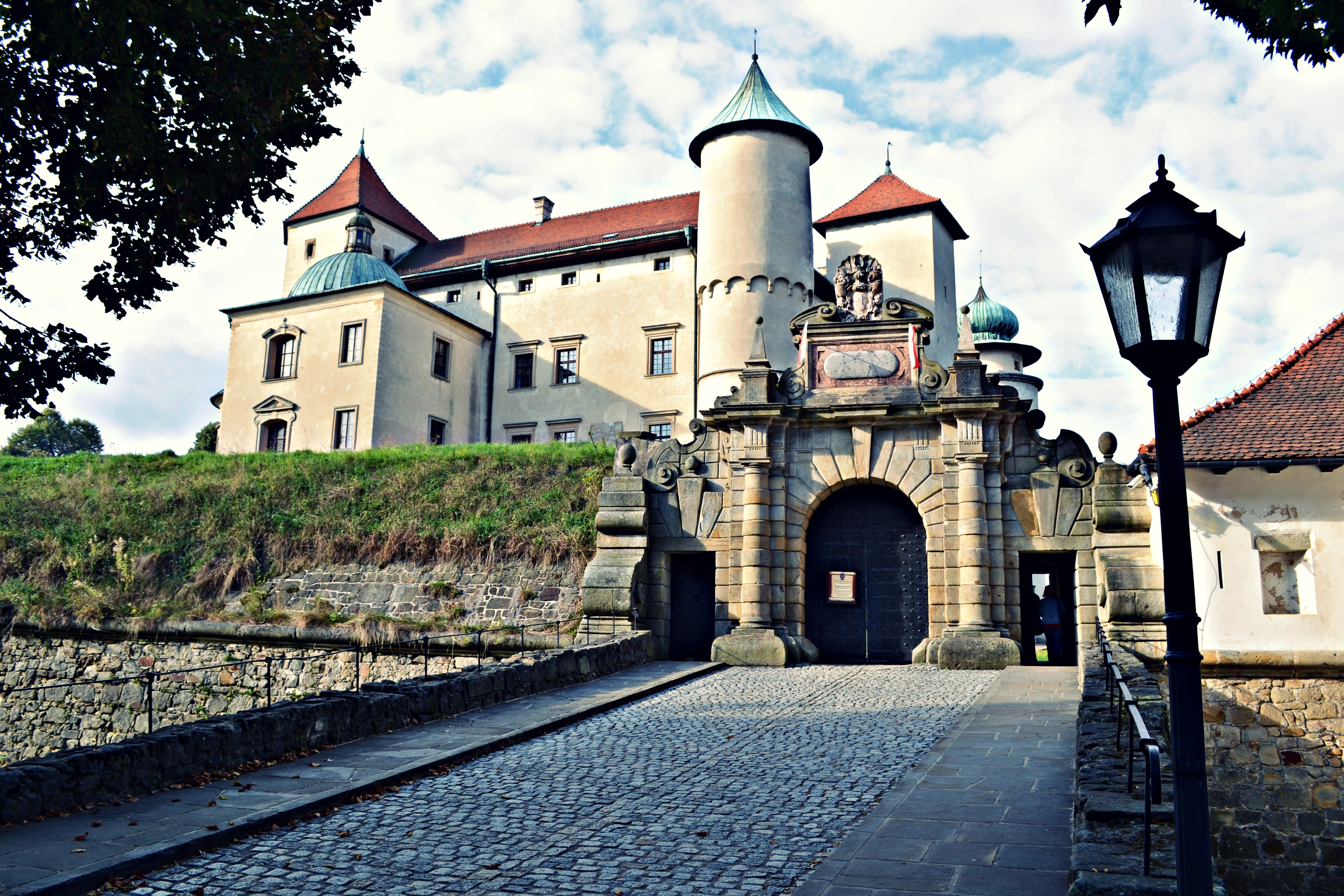 gmina Nowy Wiśnicz, zamek, XVI, po 1620